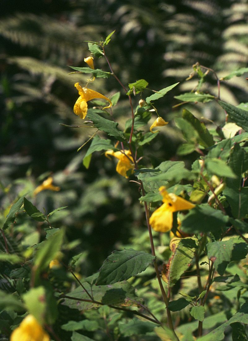 Großes Springkraut (Impatiens noli-tangere), Springkrautgewächse (Balsaminaceae) - Slowakei/Slovensko/Slovakia: Banskobystrický kraj, Okres Brezno, bei Beňuš ENE Brezno